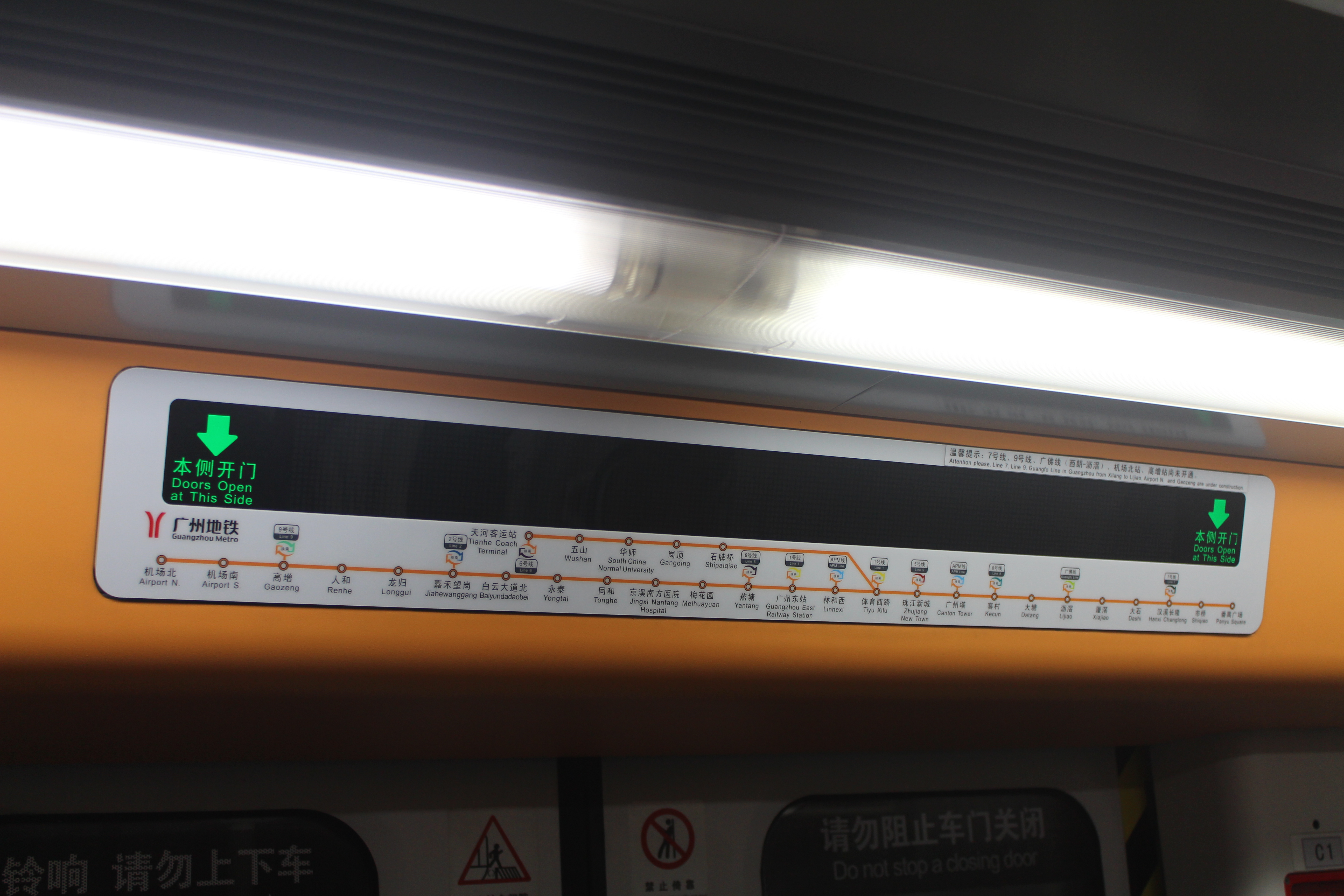 广州地铁B1型列车后期改装的信息滚动屏